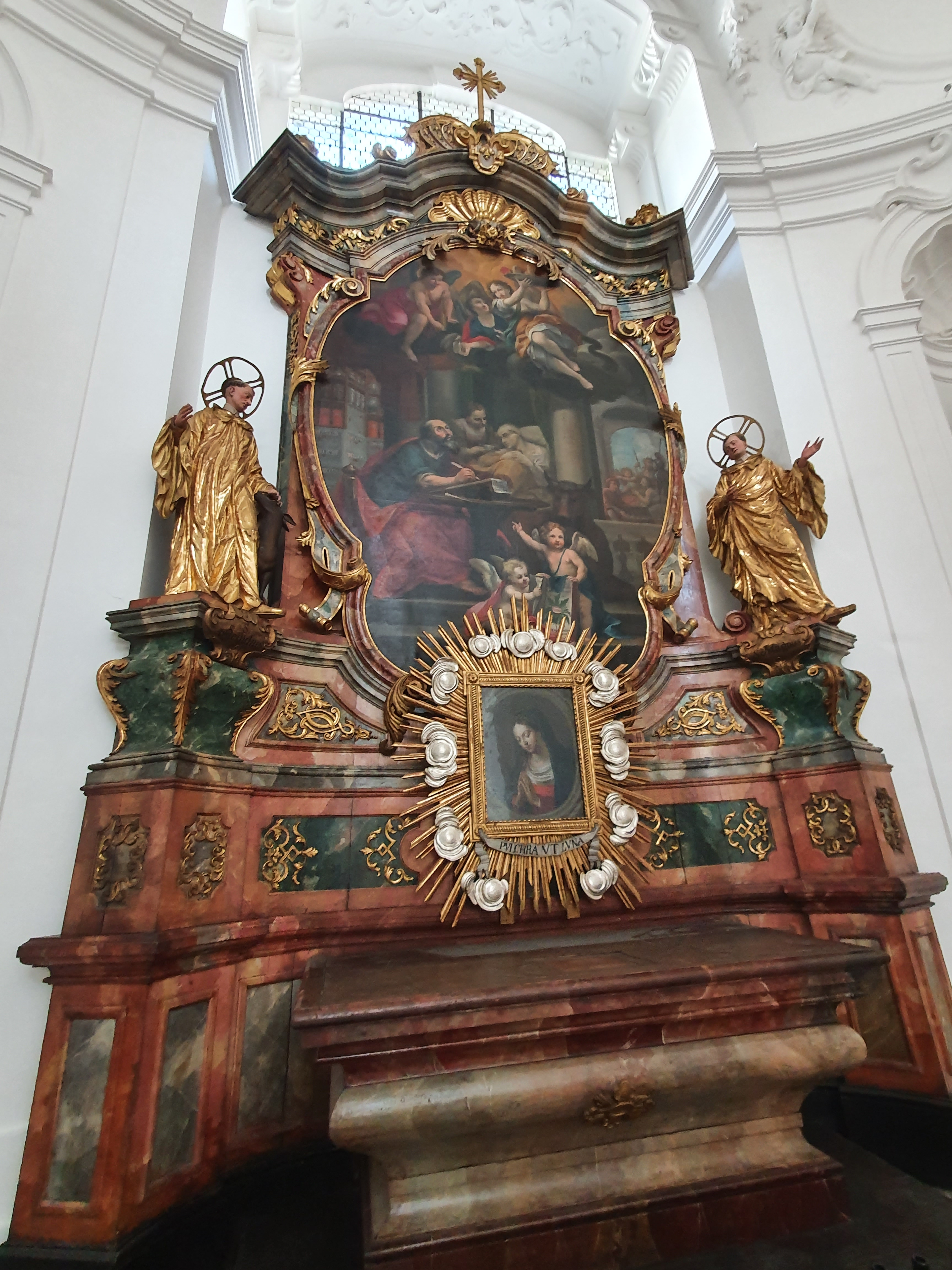 Hl. Lukas in der nordöstlichen Kapelle mit Vorsatzbild «Pulchra ut luna»